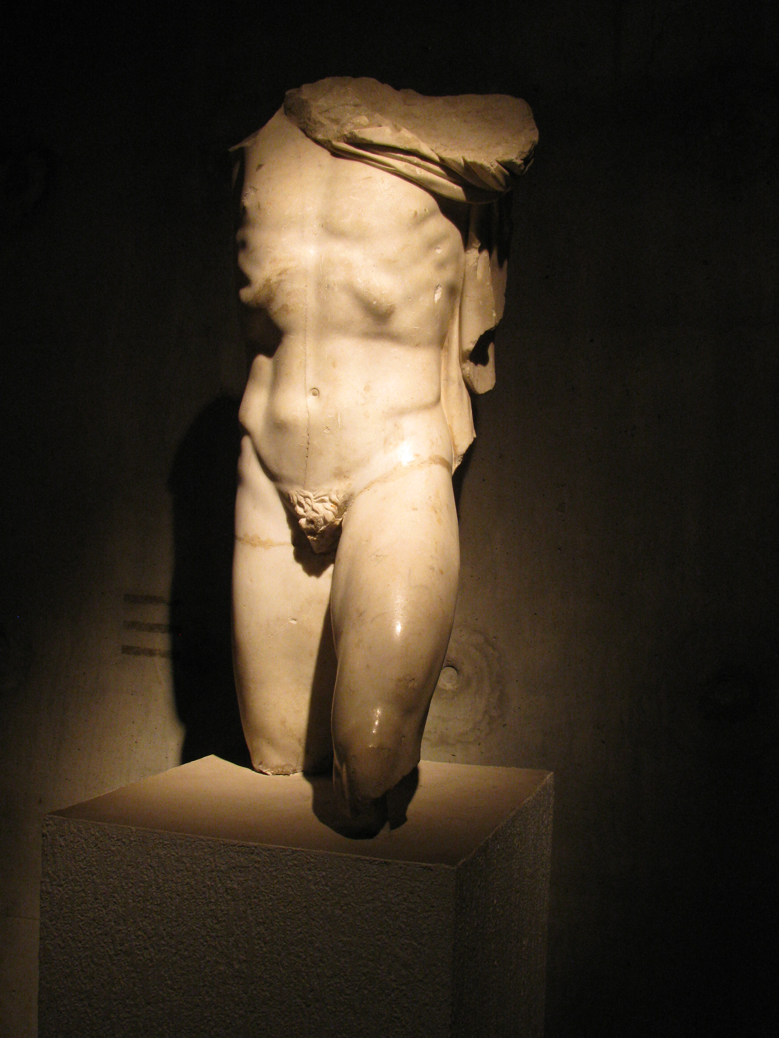 Trois fragments recollés d'une statue grandeur nature en marbre blanc (1,80m de haut, pour 1,05m restant. Trouvés en 1964 dans les fouilles de l'esplanade au pied de l'odéon romain de Lugdunum (Lyon). Œuvre hellénistique probablement du milieu du IIe siècle. Exposé au muse gallo-romain de Fourvière, N° inventaire 2000.0.553